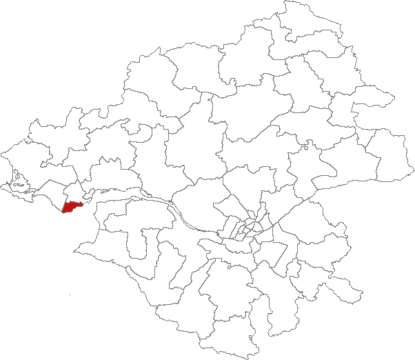 Carte de localisation du canton de Saint-Nazaire-ouest (France, Loire-Atlantique)